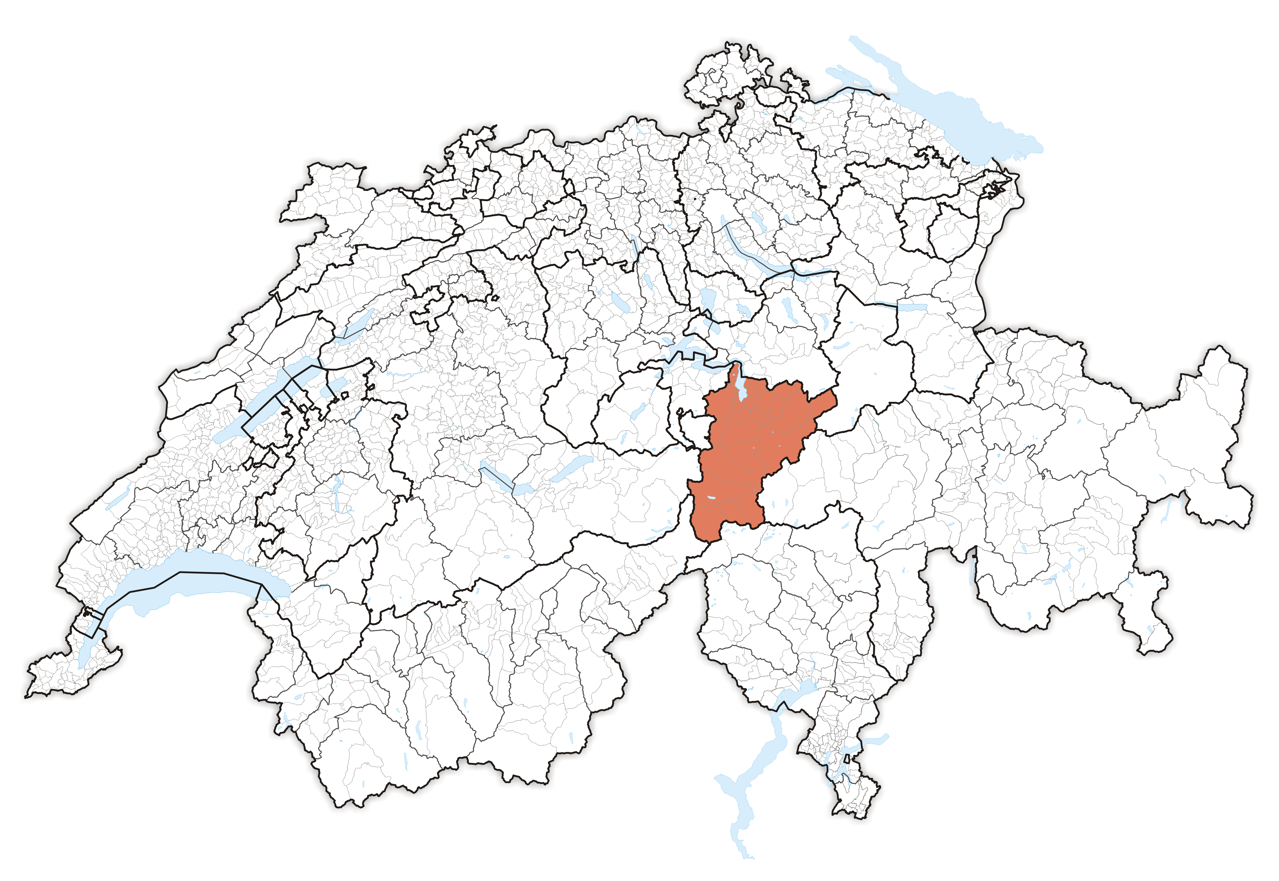 Canton Uri